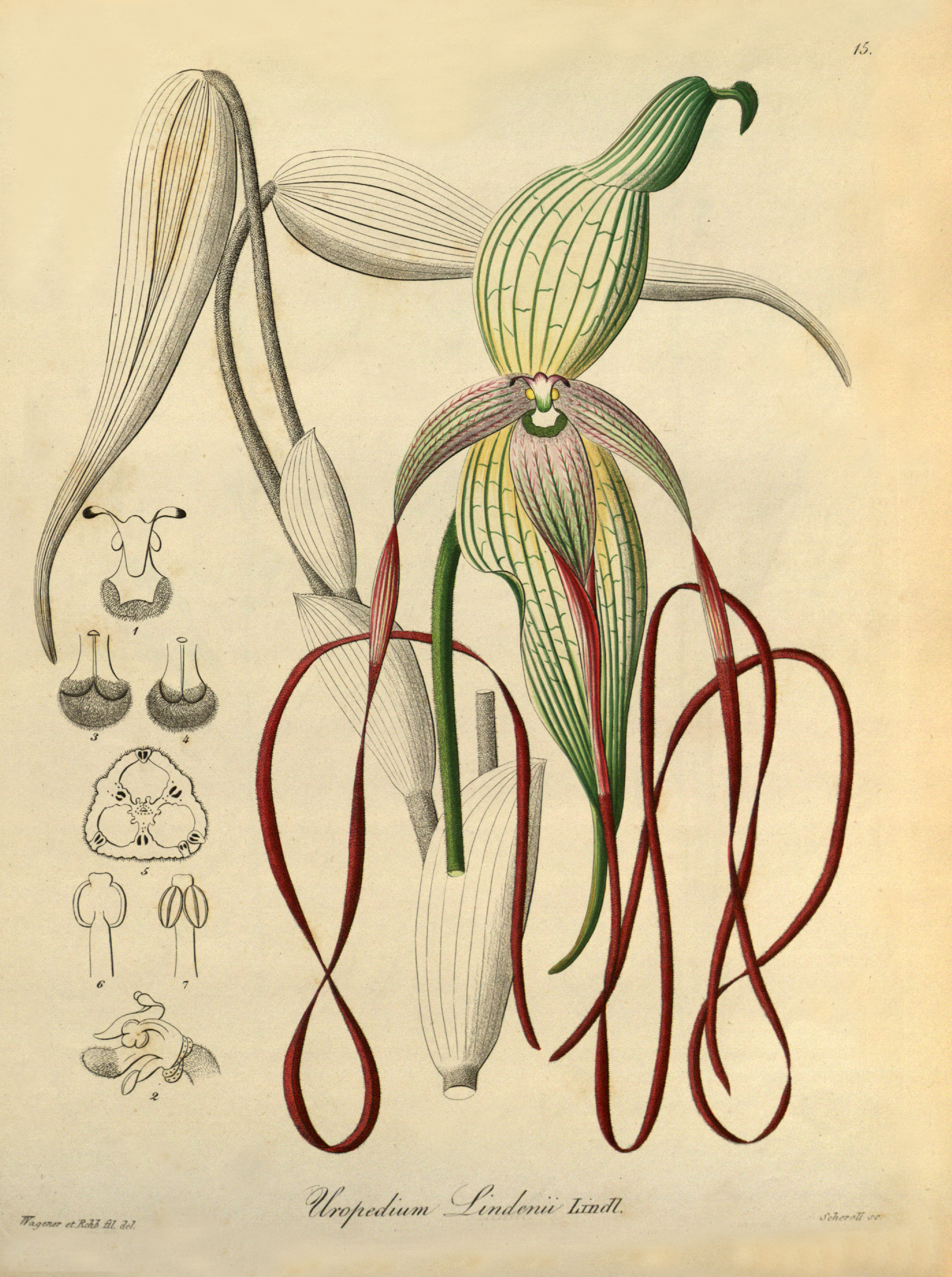 Illustration of Phragmipedium lindenii (as syn. Uropedium lindenii)